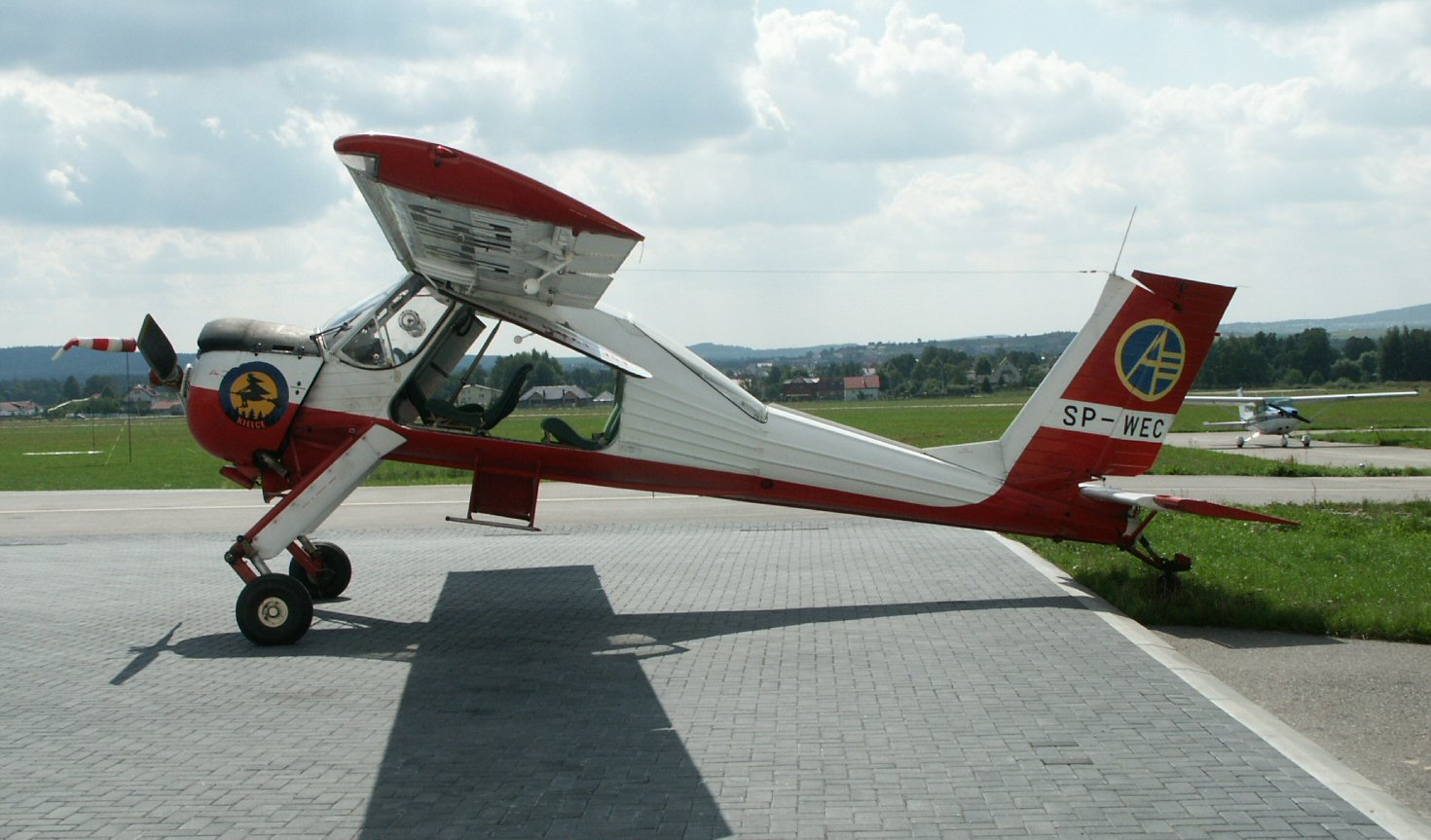 PZL-104 Wilga 35 (SP-WEC) of Aeroklub Kielecki at Kielce-Masłów Airport